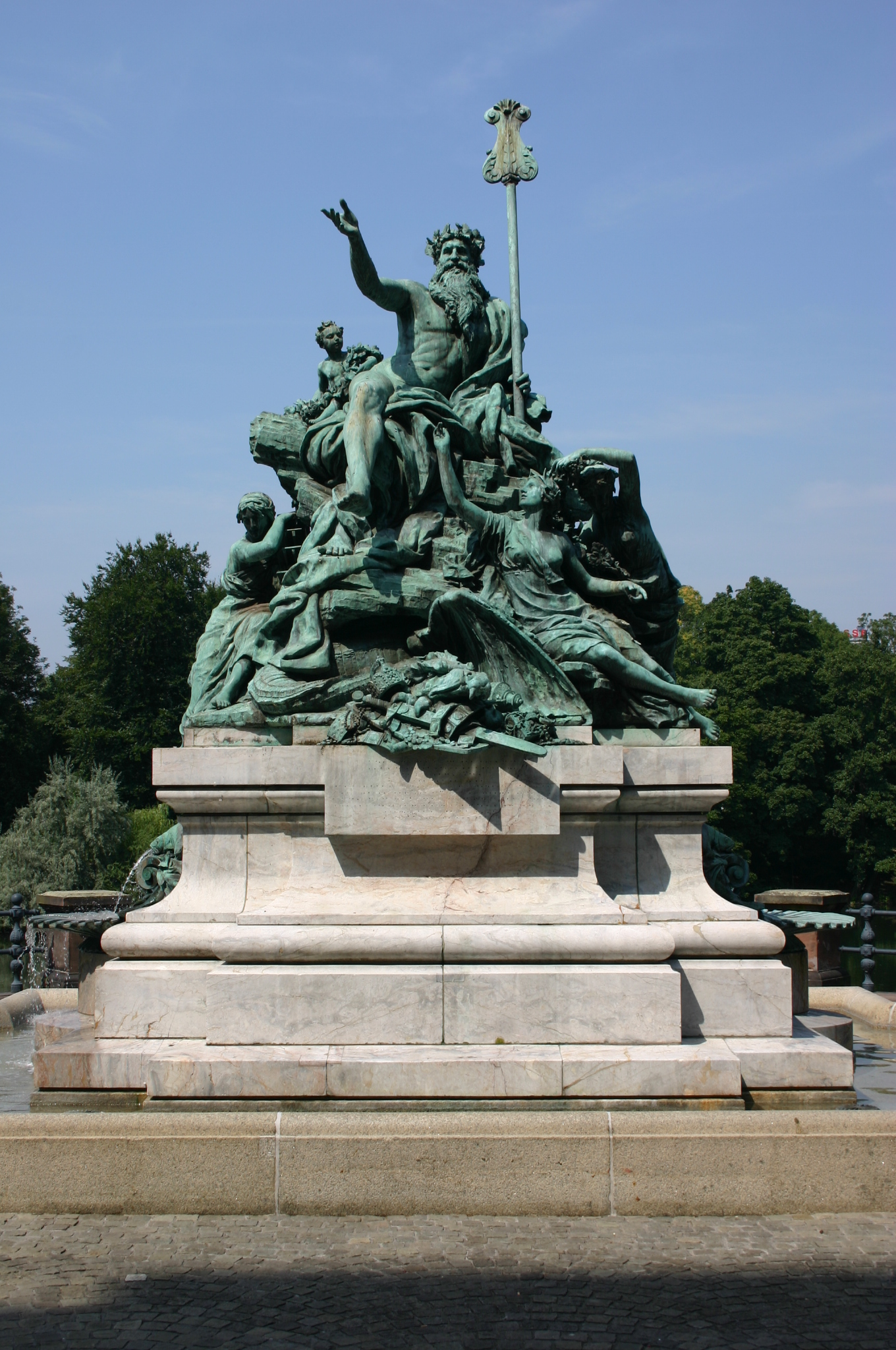 Brunnenplastik „Vater Rhein und seine Töchter“ in Düsseldorf-Unterbilk / Nordrhein-Westfalen